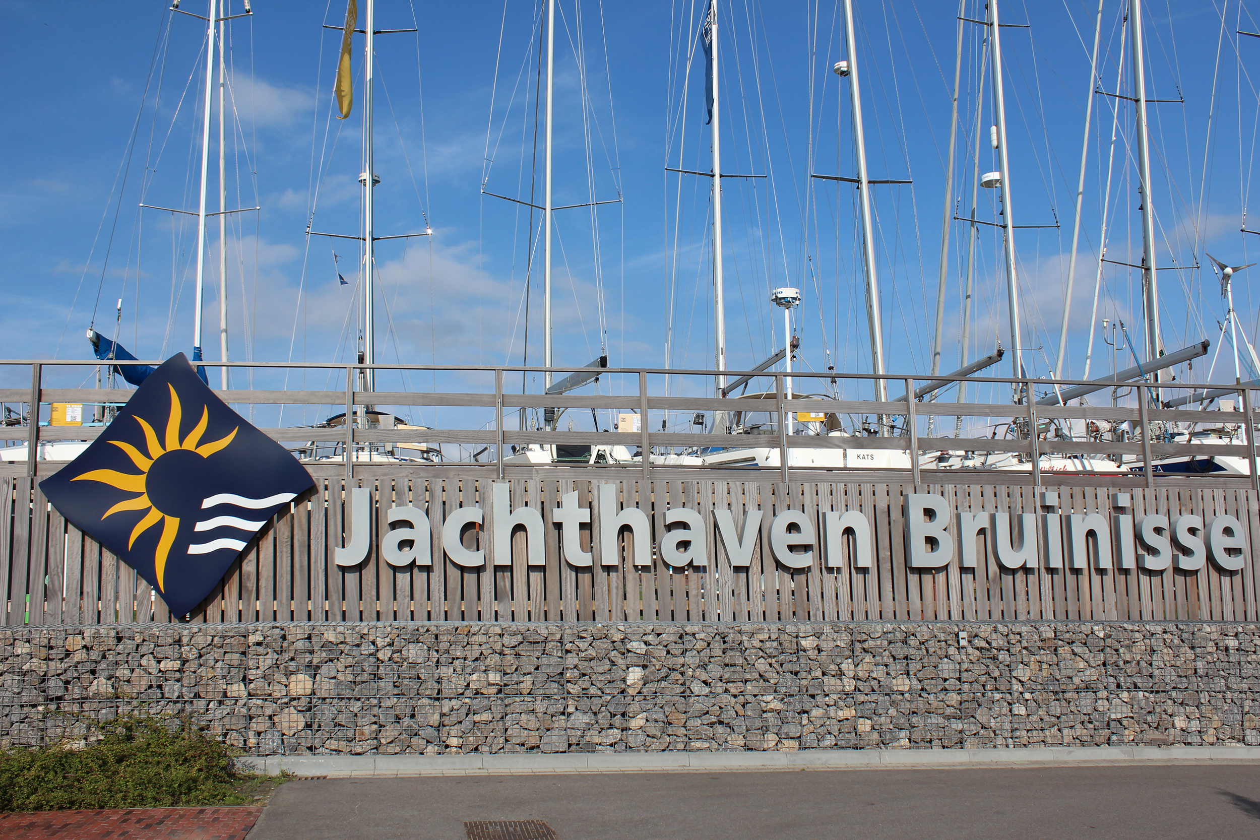 Namenszug des Jachthaben Bruinisse